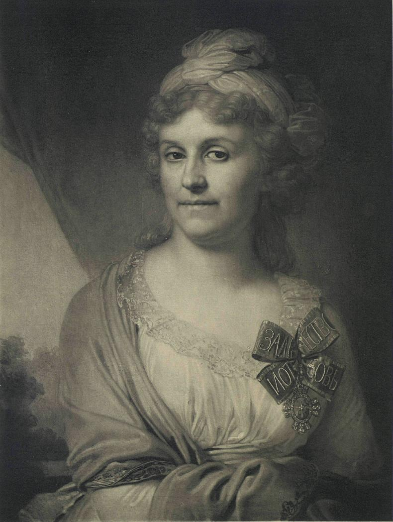 Дарья Александровна Валуева, ур. Кошелева (1757-1836), жена П.С.Валуева (1743-1814).